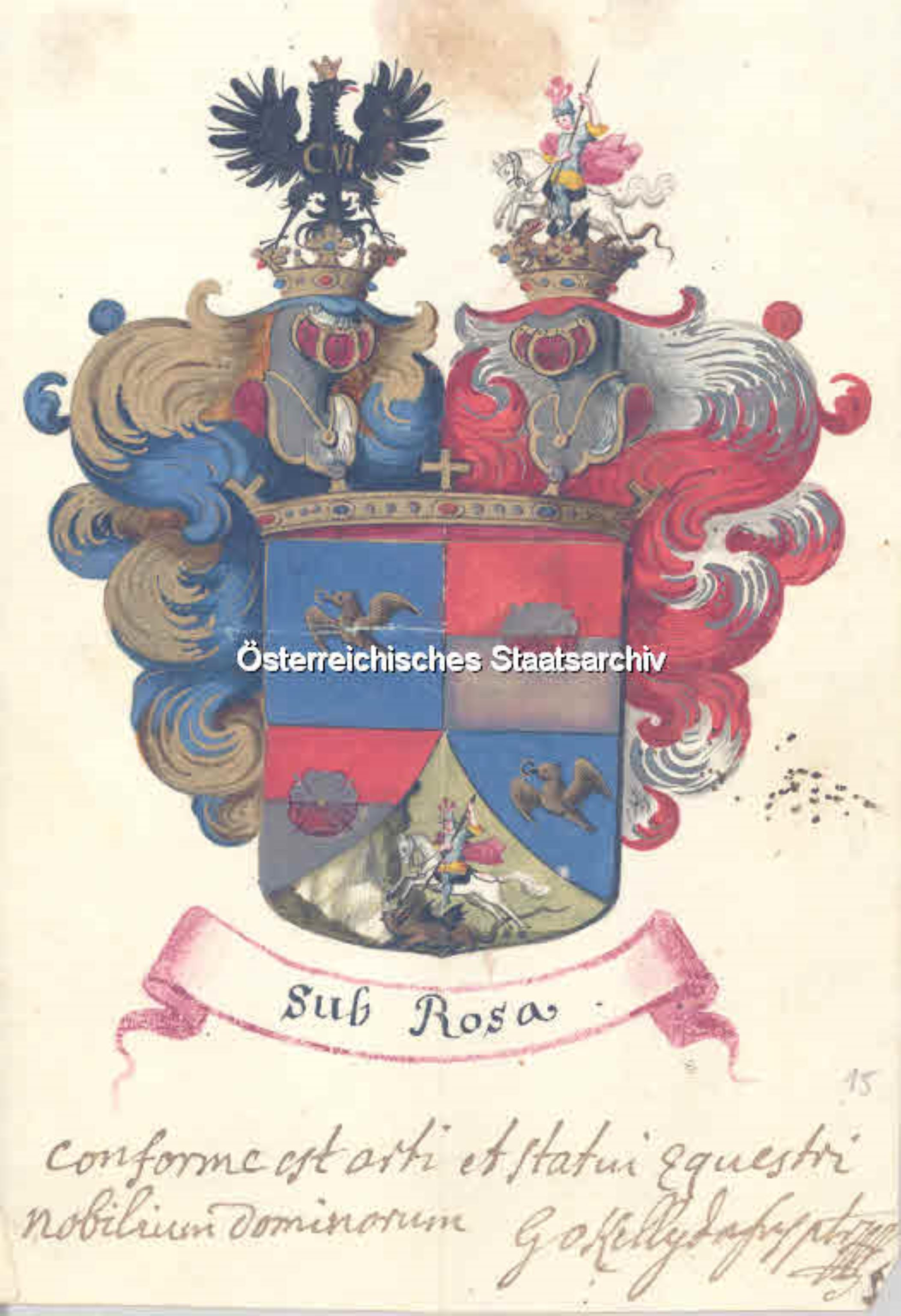 Wappenbesserung des Philipp Wilderich Johann Georg Georgendiel von Georgenthal, kaiserlicher wirklicher geheimer Hofrat und Reichshofreferendar, aus Limburg an der Lahn im Trierschen, Ritterstand als „Georgendiel Edler Herr von Georgenthal, Ritter”.